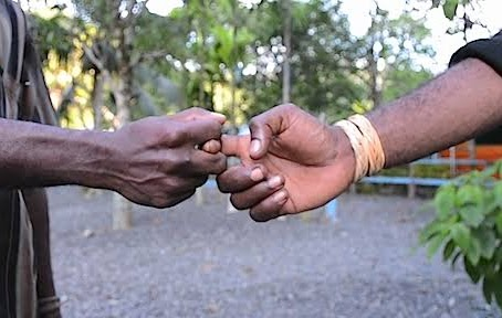 salam papua